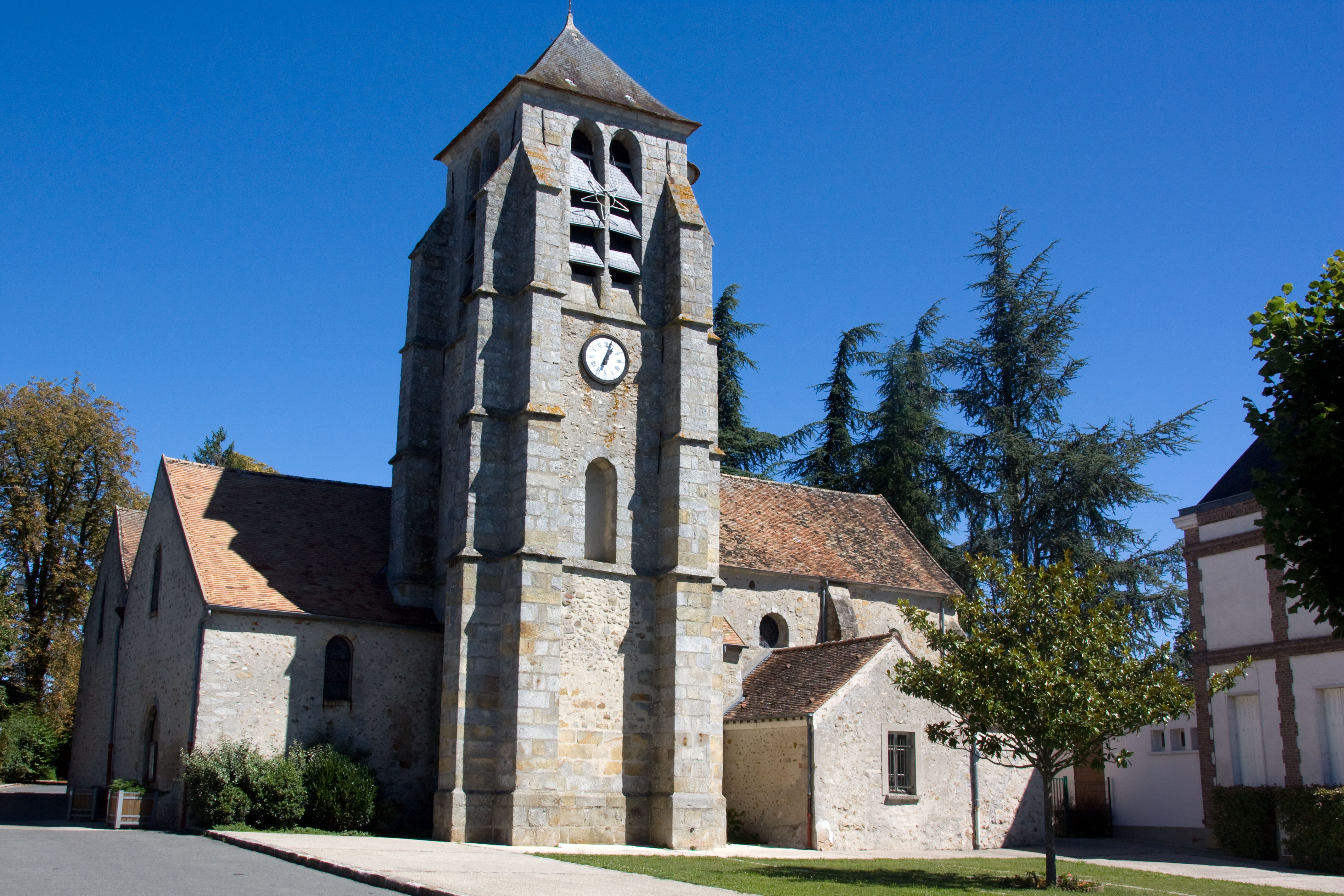 Église Saint-Corneille d Chartrettes, Seine-et-Marne, France